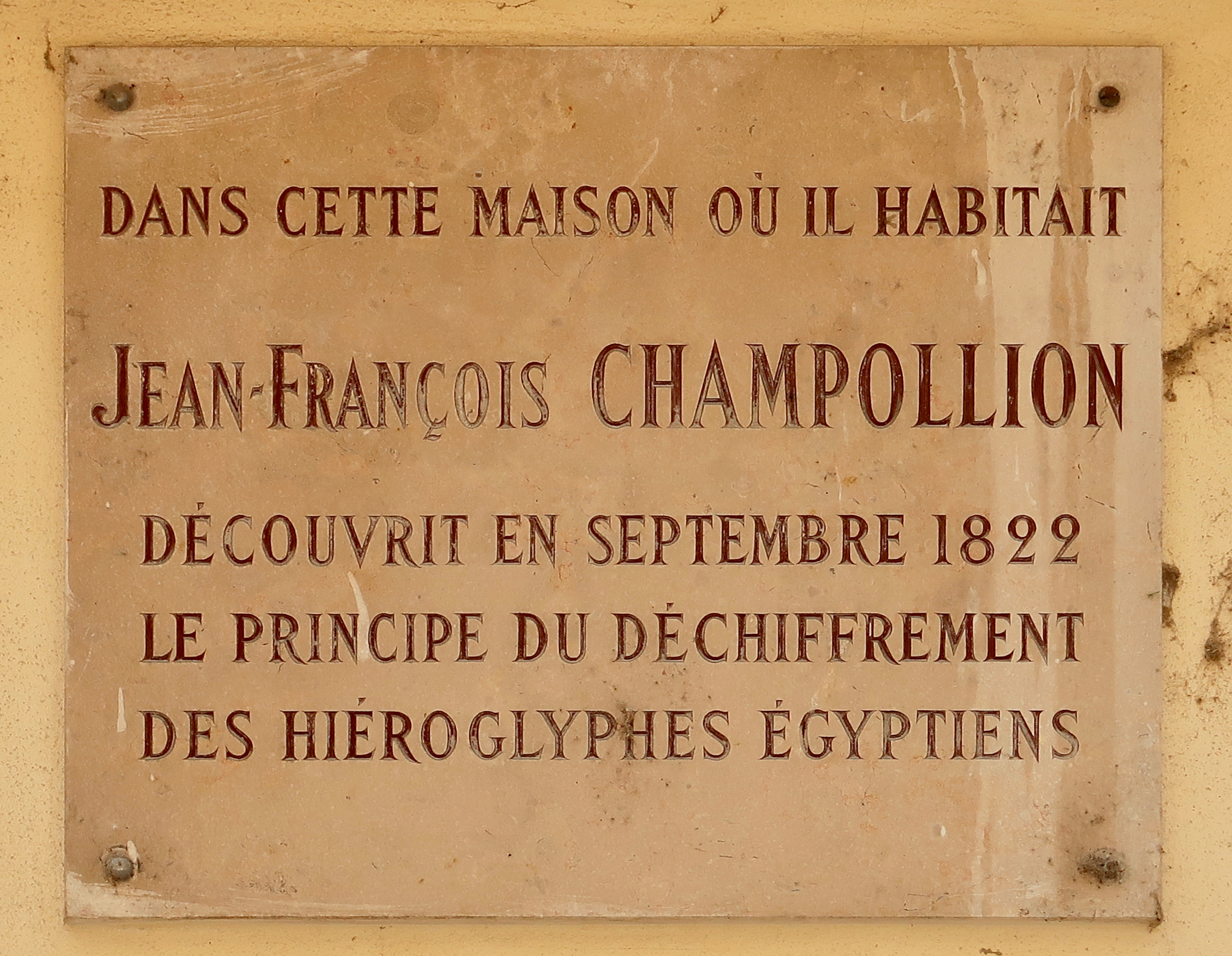 Plaque en hommage à Champollion, 28 rue Mazarine (Paris, 6e).